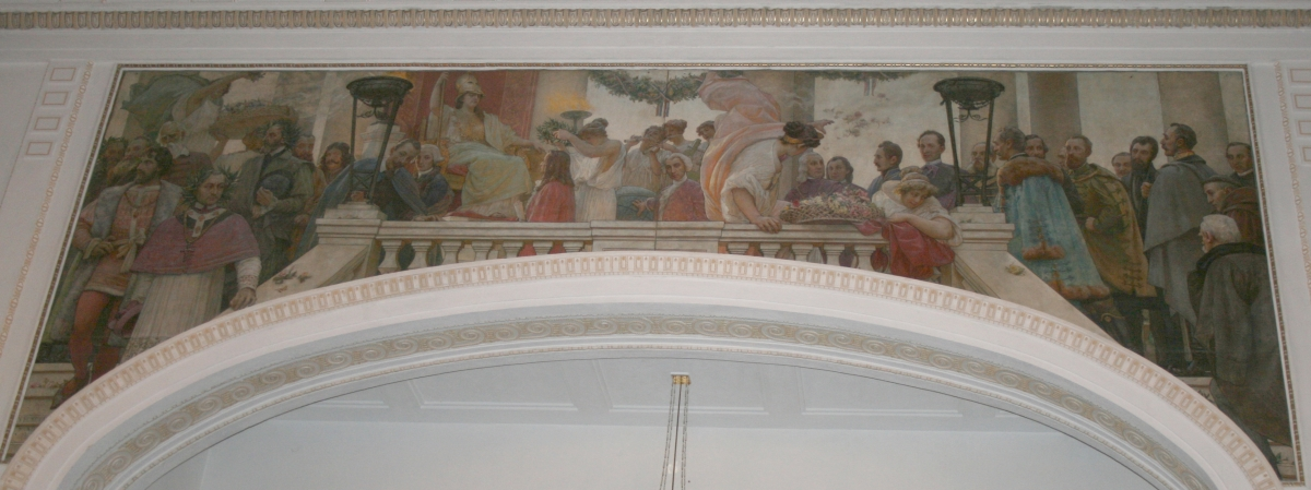 Velika čitaonica Hrvatskog državnog arhiva. Magistralno djelo čitaonice je golema kompozicija Vlahe Bukovca "Razvitak hrvatske kulture" koja je smještena iznad središnjeg nosivog luka. Slikana svjetlom kromatskom skalom, bojama mjestimice prozračnim poput akvarela, slika prikazuje povorku od 27 hrvatskih velikana. Slijeva na desno se između ostalog nalaze Marko Marulić, Julije Klović, Petar Zrinski, Marin Getaldić, Ivan Gundulić u apoteozi, Ruđer Bošković, Maksimilijan Vrhovac, Ljudevit Gaj i J. J. Strossmayer. Između druge i treće osobe zdesna uguran je jedan portret koji vjerojatno propada Rudolfu Lubynskom. Snimljeno tijekom Noći muzeja u Hrvatskom državnom Arhivu u Zagrebu